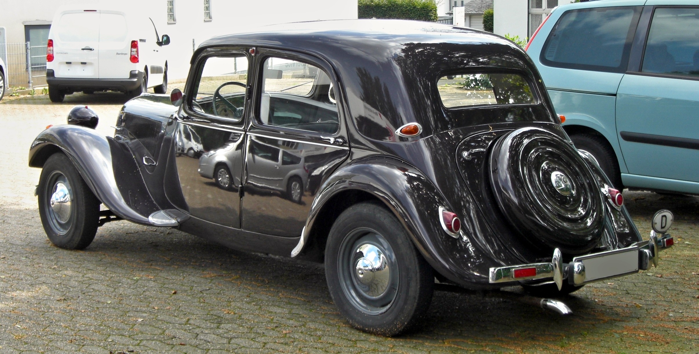 Citroën Traction Avant Légère